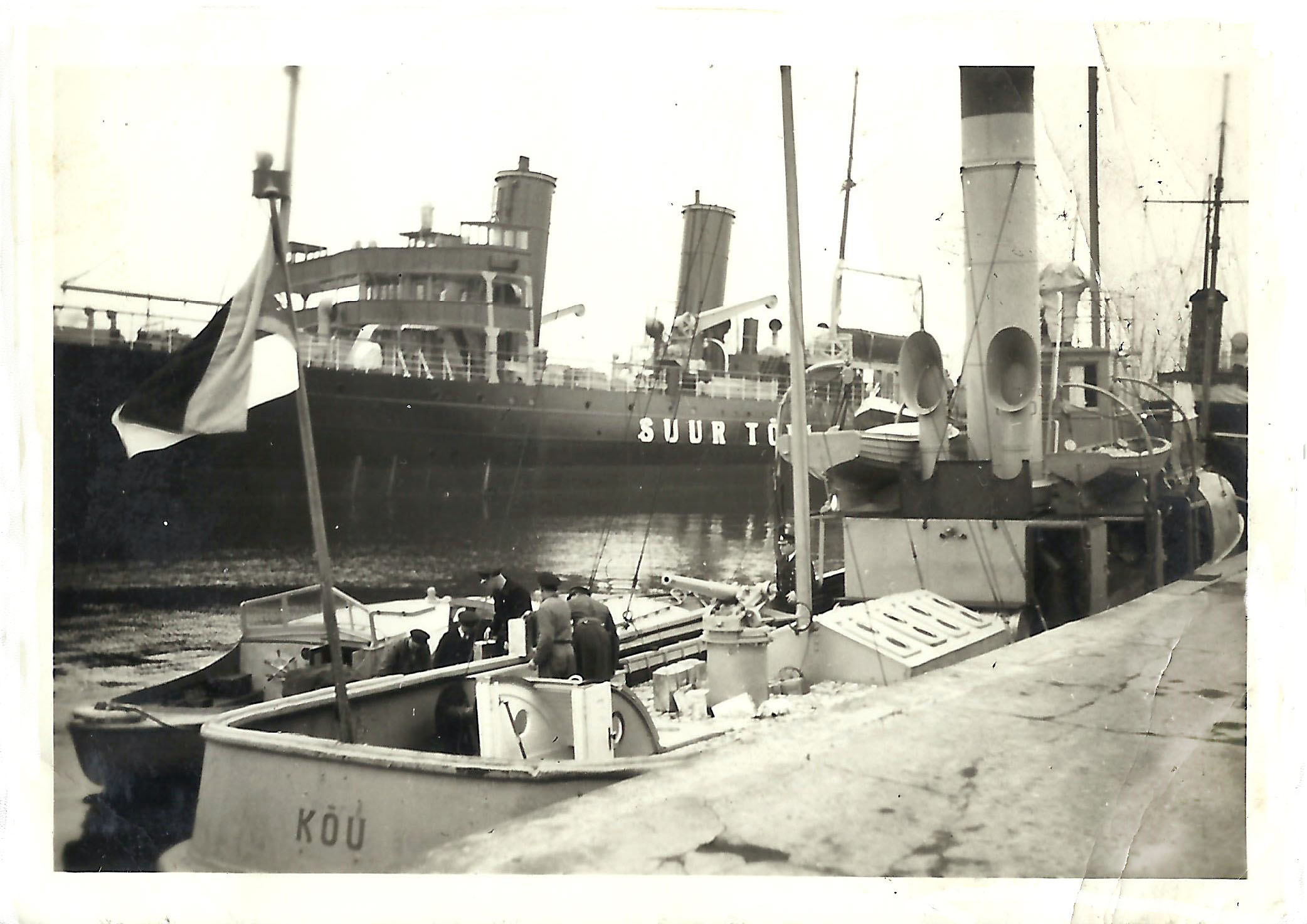 Pildil Kõu ja Suur Tõll (pildistamisaeg, koht ja muu teave puuduvad)